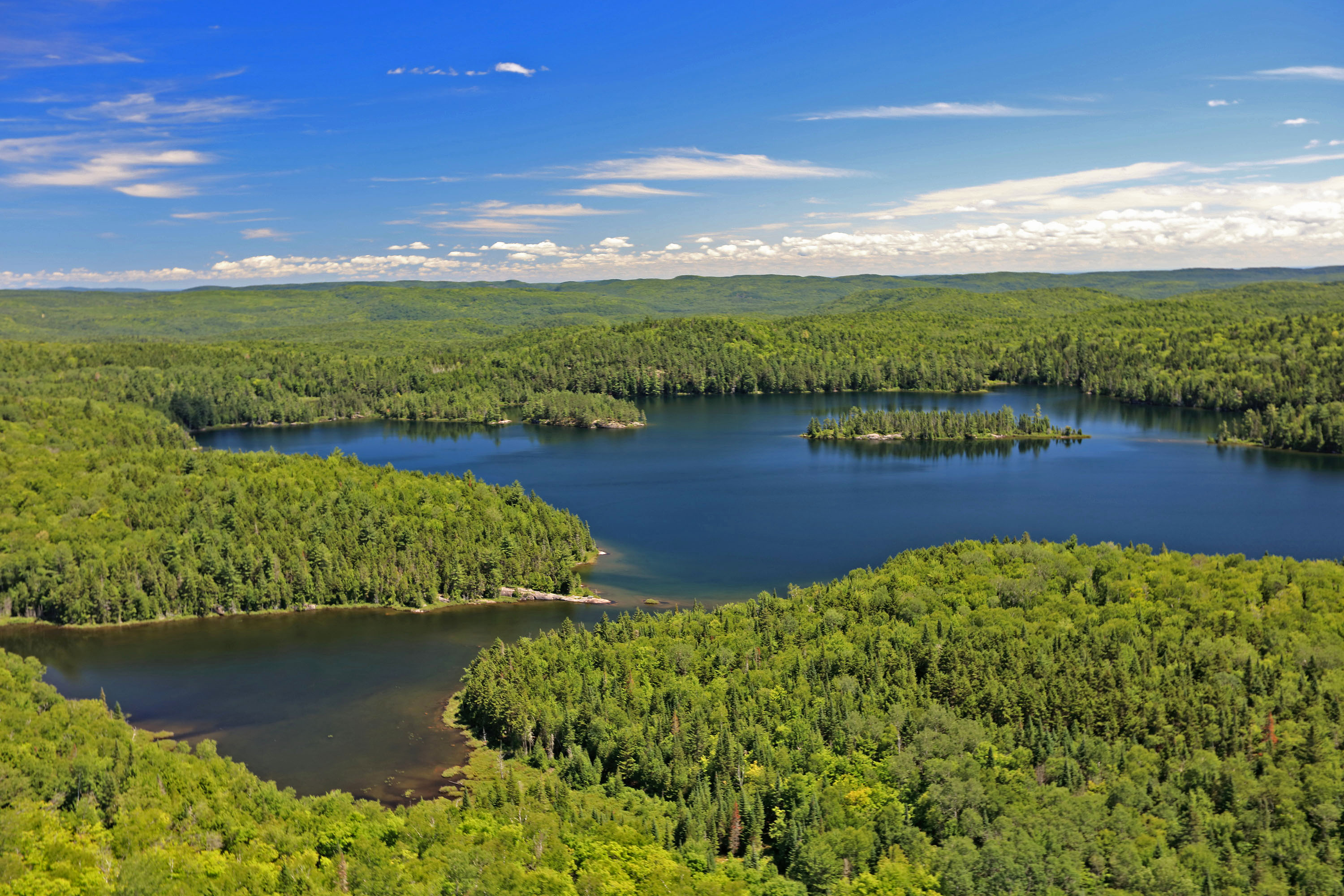 Vyhlídkový let na Sacacomií